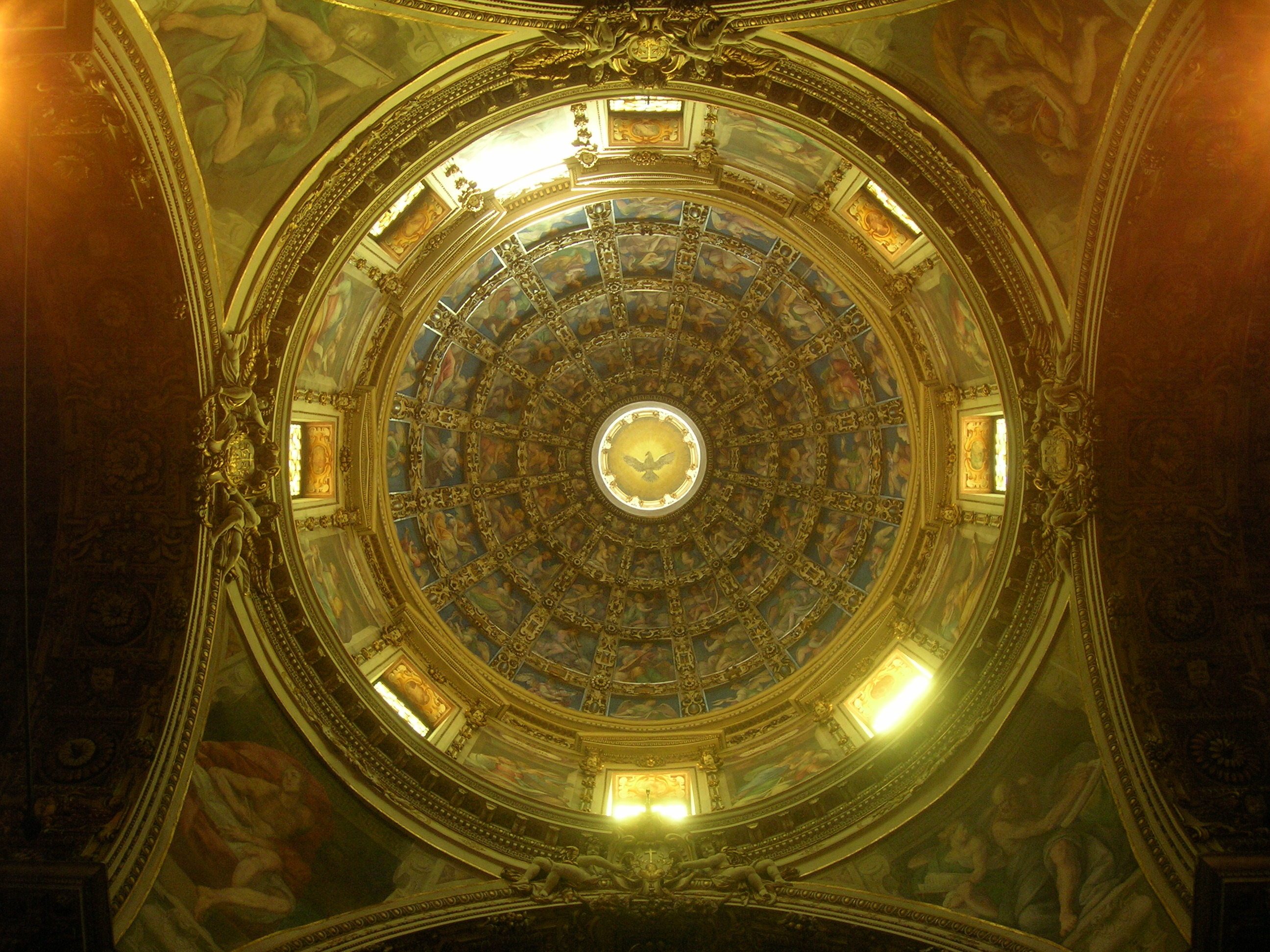 La cupola di San Vittore al Corpo, Milano.